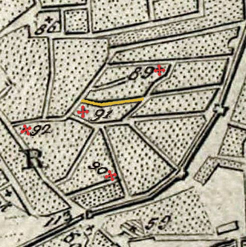 На Мичуринском плане Москвы 1739 года жёлтым цветом обозначен исчезнувший в 1745 году Голосов переулок, названный по владению думного дворянина, поэта и переводчика - Лукьяна Тимофеевича Голосова. Красным цветом обозначены церкви.